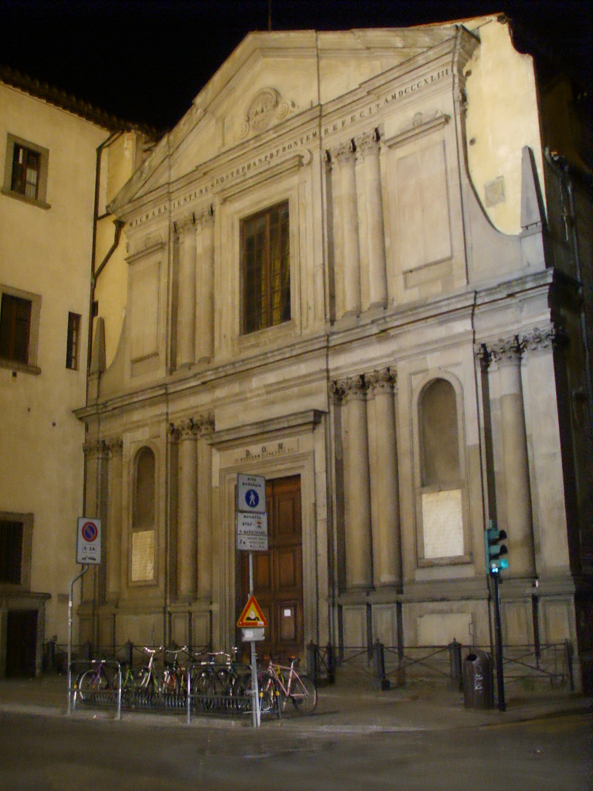 San_giovannino_degli_scolopi_by_night